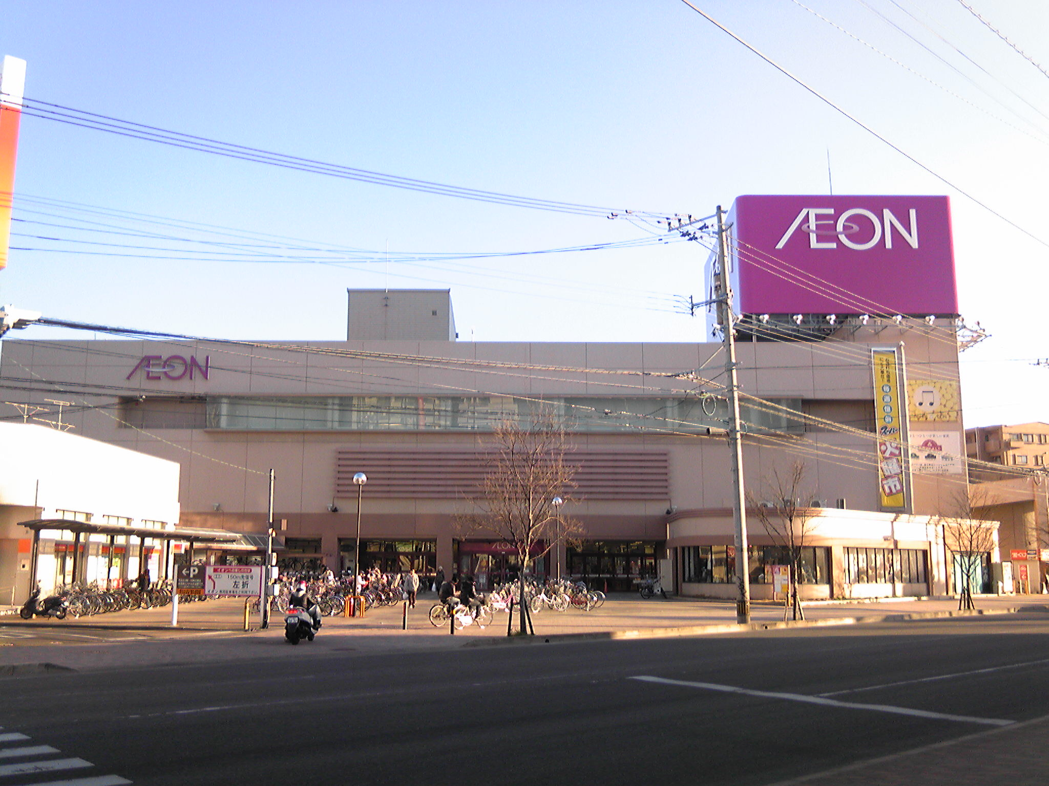 イオン原店店舗外観（福岡市早良区）